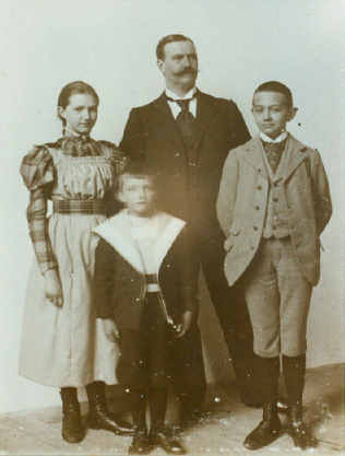 Der deutsche Orgelbauer Ernst Röver mit Familie